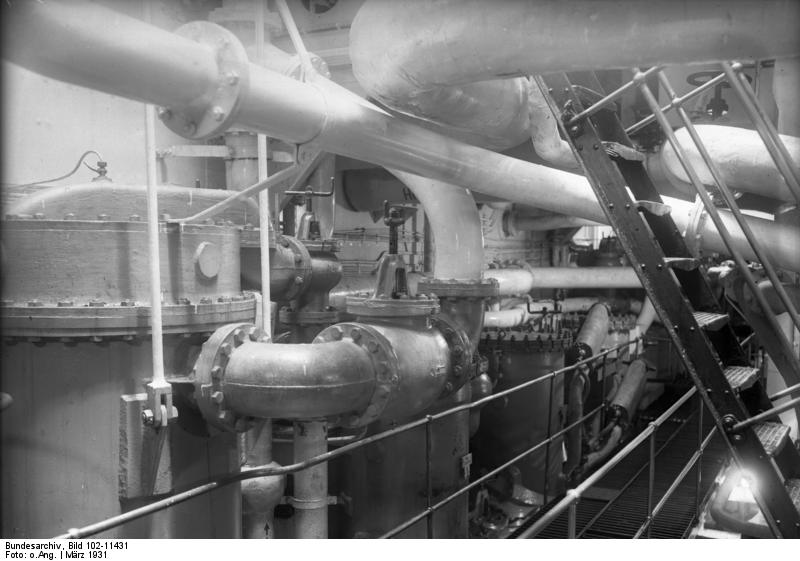 Mit Deutschlands schönstem Ozeanriesen nach Amerika! Das Herz des deutschen Ozeanriesen "Bremen", ein Teil der gewaltigen Maschinenanlage.